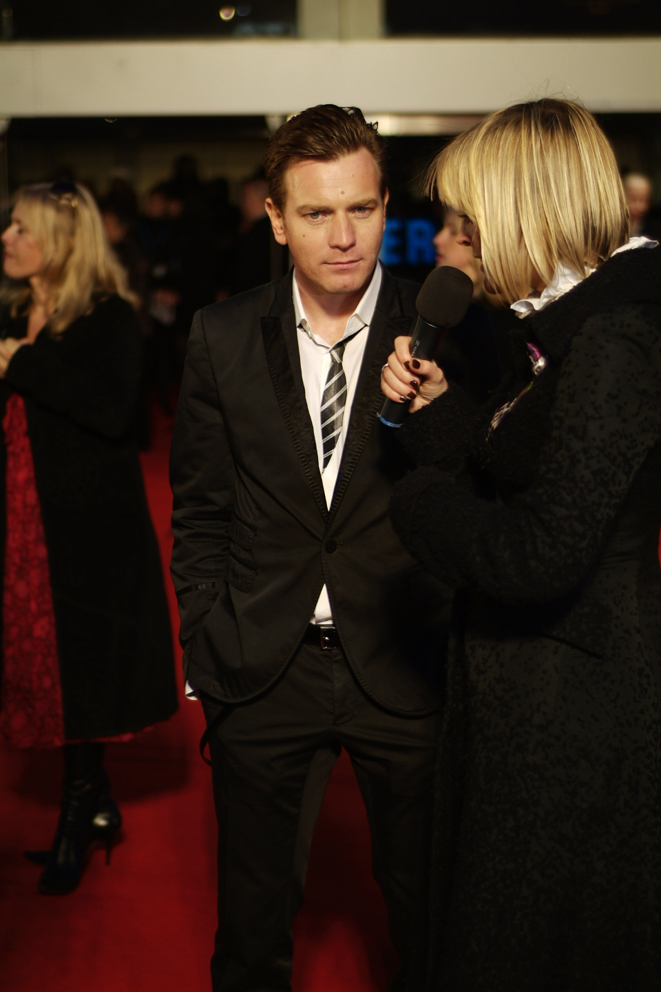 Miss Potter Premiere